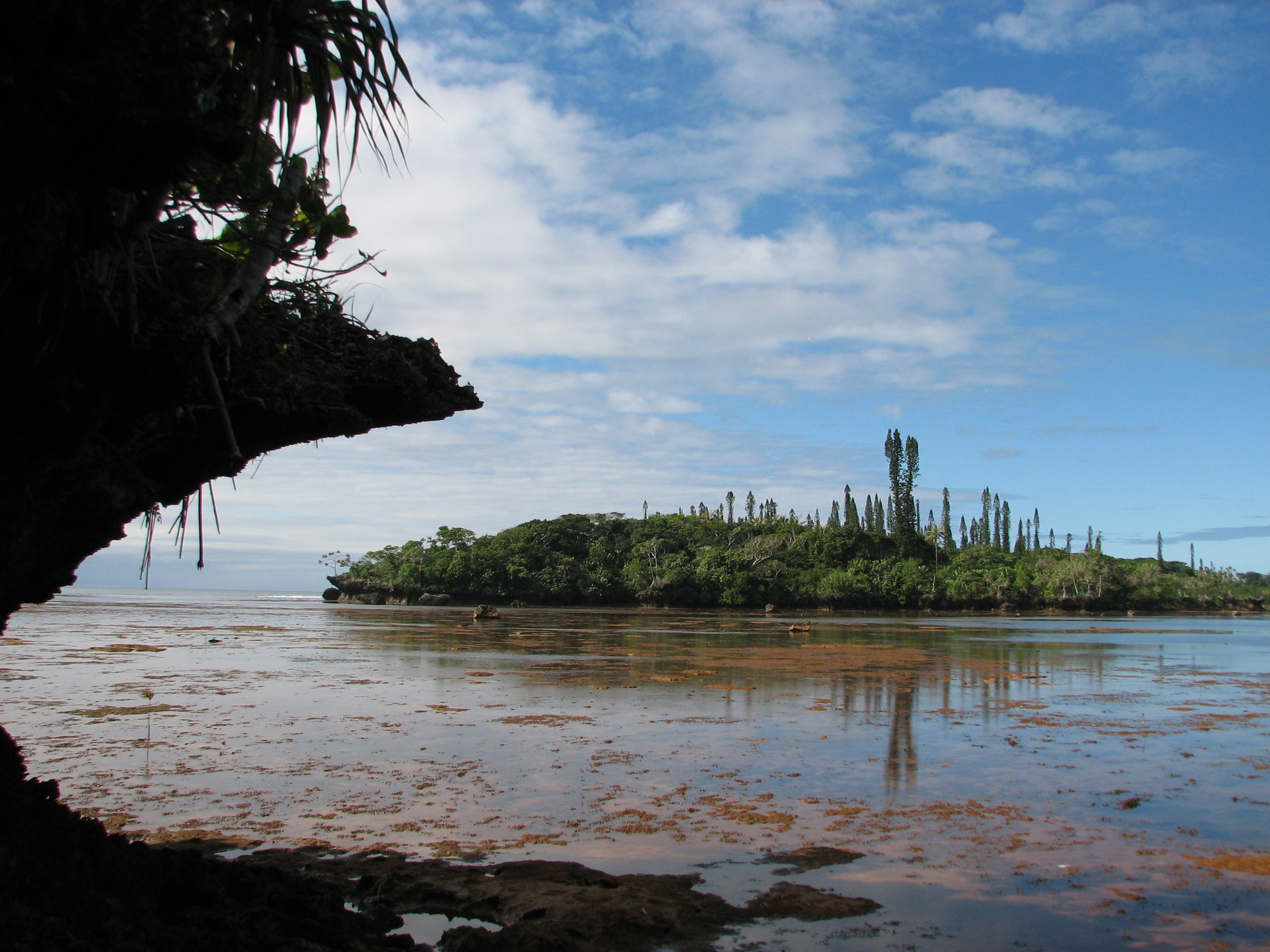 Végétation rupicole à Araucaria sur récif corallien soulevé, Yaté, Nouvelle-Calédonie